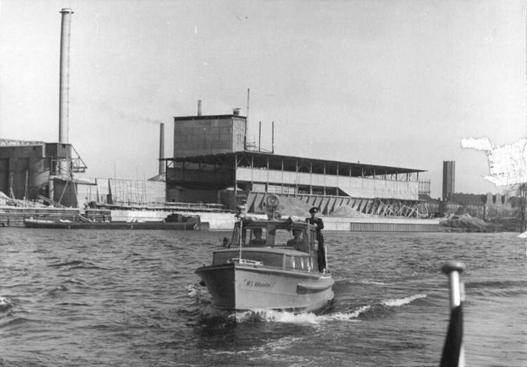 Berlin, Hydromentwerk Rummelsburg, Wasserschutzpolizei Illus Quaschinsky Kno-He. 17.4.51 Berlin 1951. Ein Boot der Wasserschutzpolizei Berlin auf der Spree. Im Hintergrund das Hydromentwerk Rummelsburg.